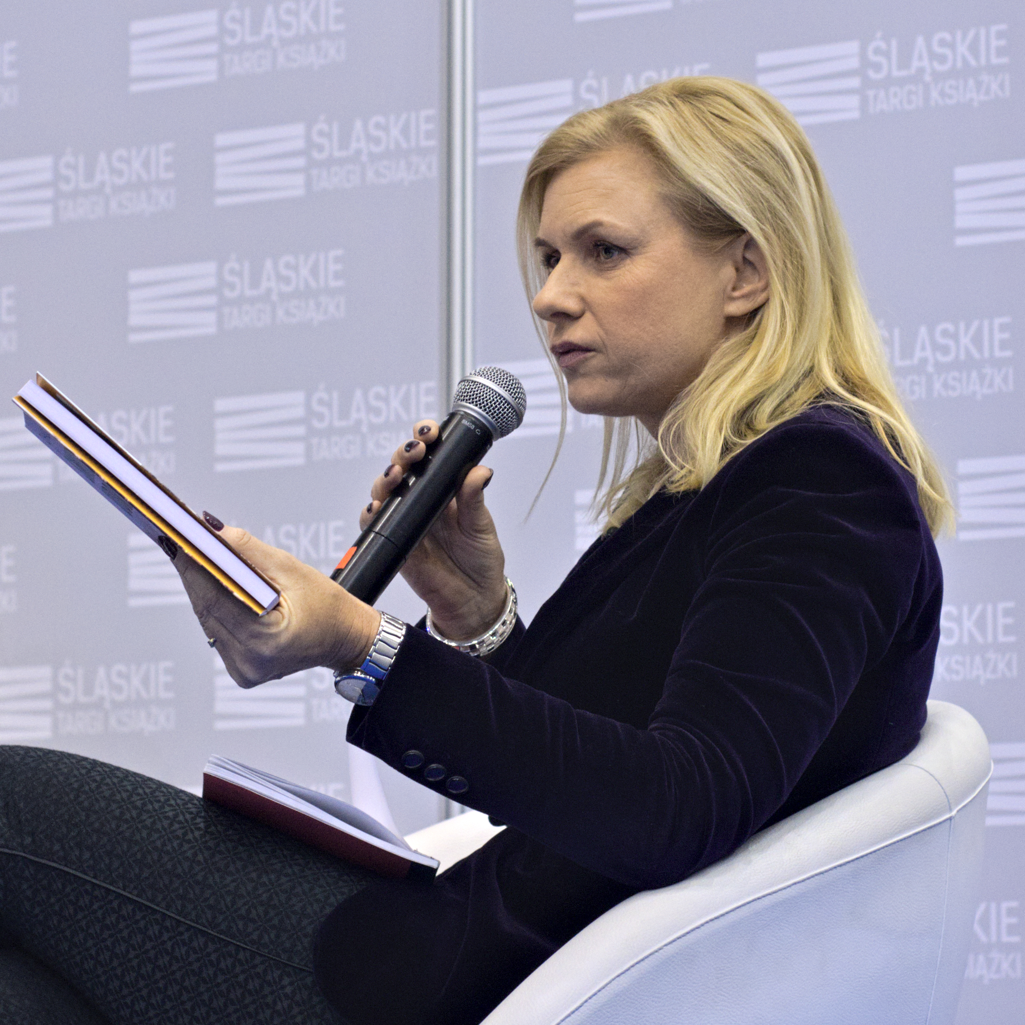 Sonia Draga, redaktor naczelna i prezes wydawnictwa Sonia Draga; zdjęcie wykonane podczas Śląskich Targów Książki w Katowicach, na terenie hali Międzynarodowego Centrum Kongresowego, podczas dyskusji "Koszmar życia na ogarniętym wojną Bliskim Wschodzie i heroiczne próby ratowania człowieczeństwa" prowadzonej przez Sonię Dragę